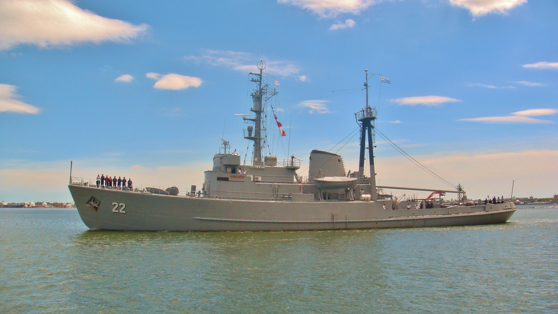 Fotografía tomada al ROU Oyarvide